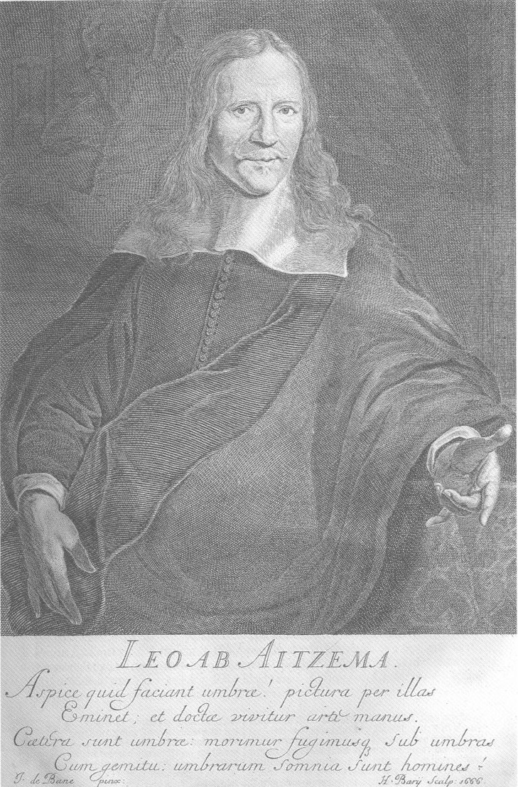 Lieuwe van Aitzema (1600-1669), Dutch historian